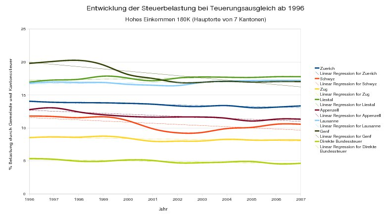 Visualisierung: Entwicklung der Steuerbelastung bei Teuerungsausgleich ab 1996 Belastung des Bruttoarbeitseinkommens durch Kantons-, Gemeinde- und Kirchensteuern für einen Verheirateten, unselbständig Erwerbenden mit Lohnausweis, ohne Kinder in der Schweiz. Basierend auf